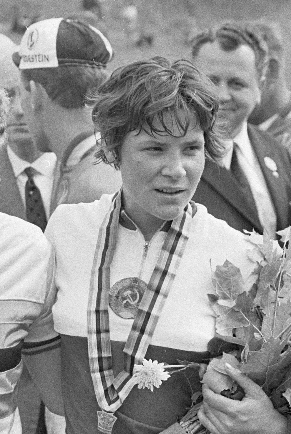 WK Wielrennen, Anna Konkina